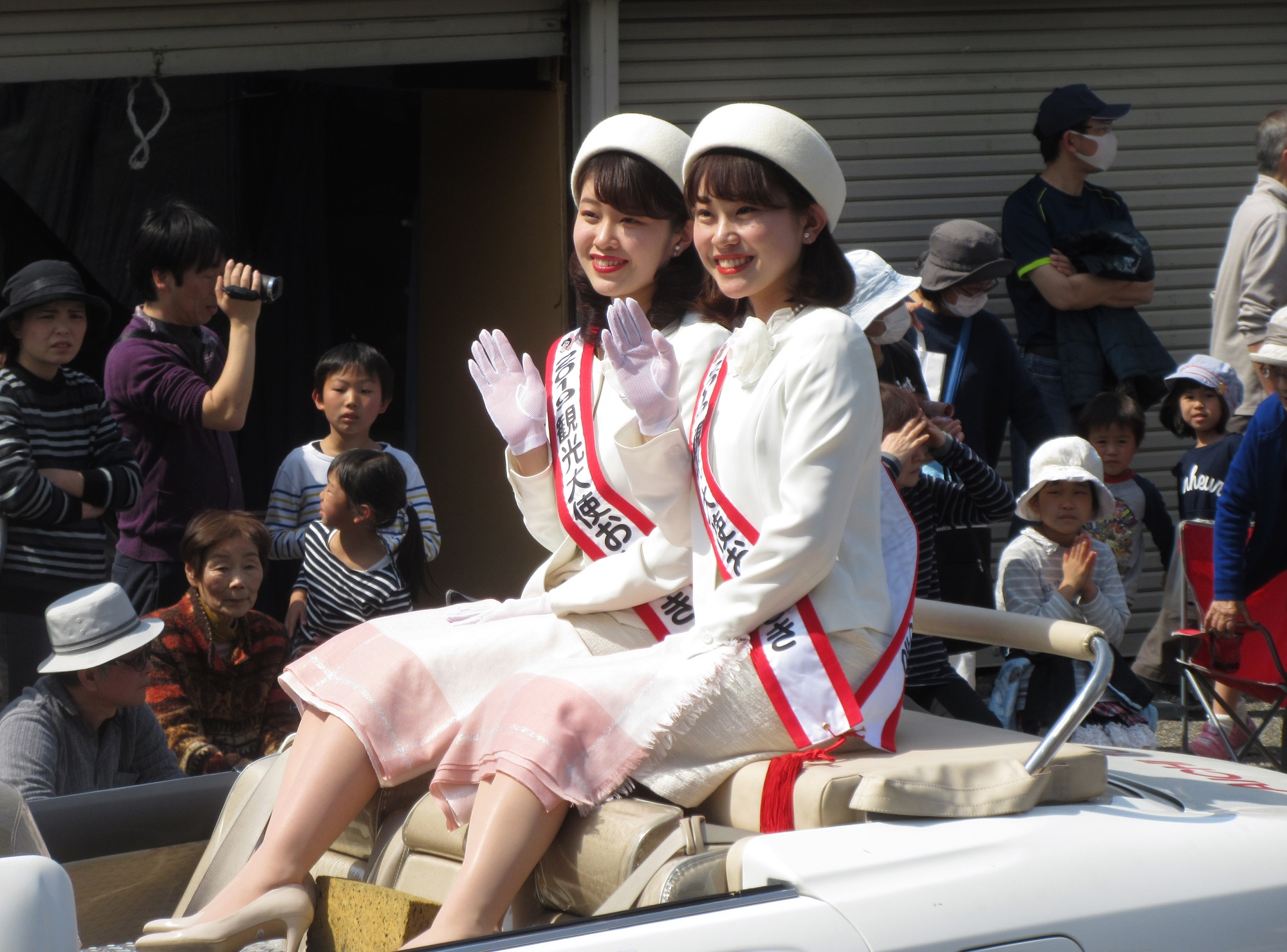 2019観光大使おかざき（主催：岡崎市観光協会）